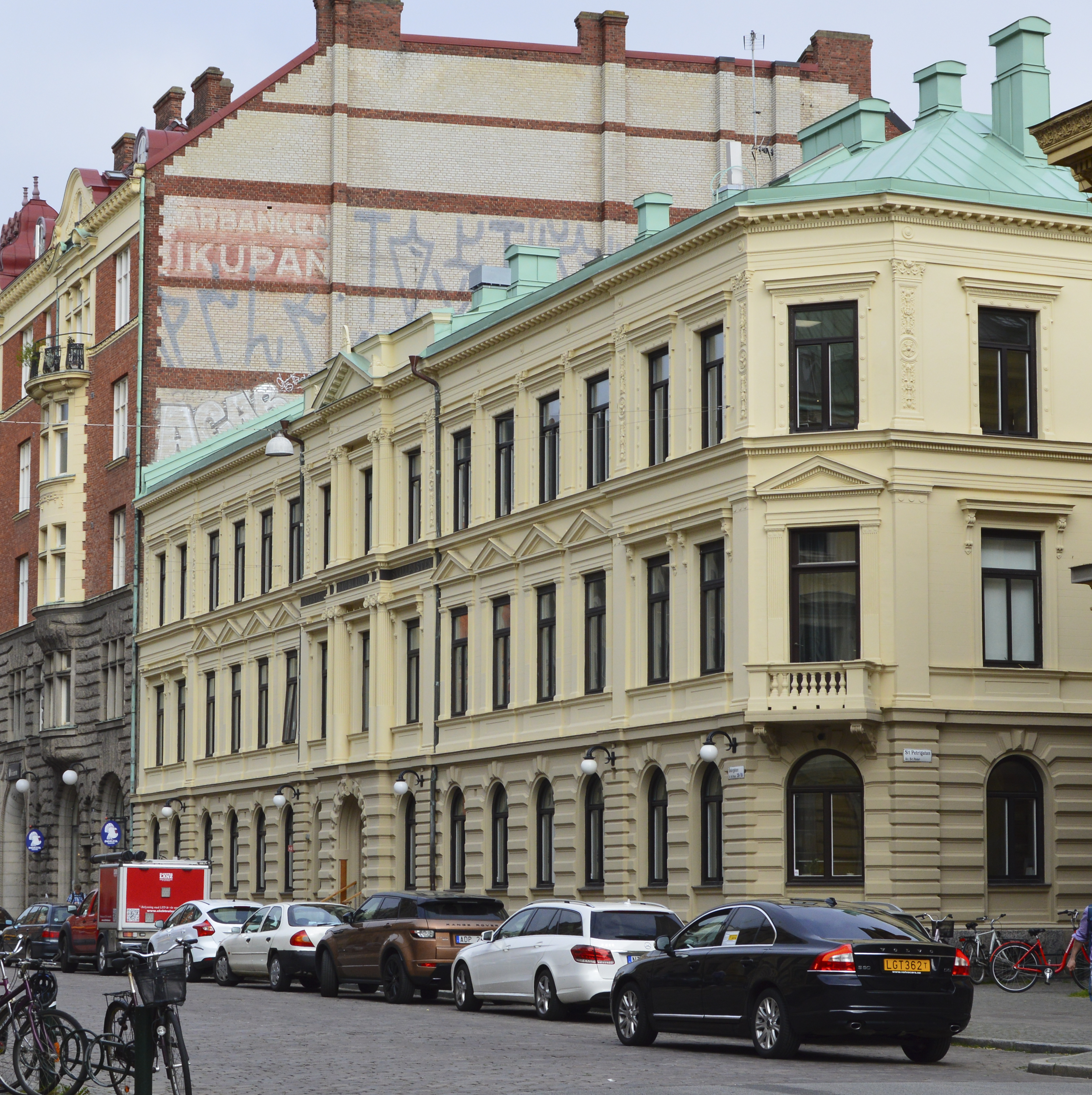 Östergatan 30 i Malmö. This file has been extracted from another file: Östergatan 30 Malmö 2015.JPG